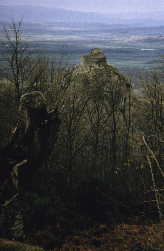 Castillo de Murutegui (Alava)